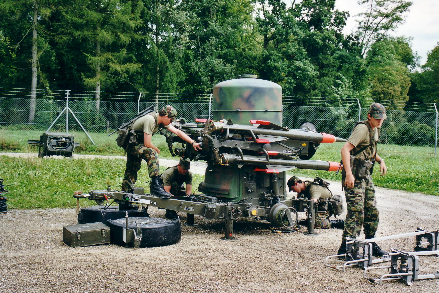 Système Rapier de la DCA de l'armée suisse en préparation durant une école de recrue en 2001 à Emmen